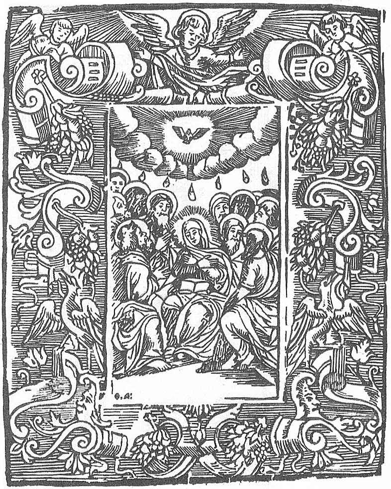 Ф. Ангілейка "Сашэсце Святога Духа на апосталаў". Ірмалог. Магілёў. 1700